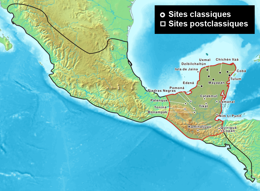 L'aire culturelle maya est délimitée par le trait rouge. Le trait noir délimite l'aire culturelle mésoaméricaine.